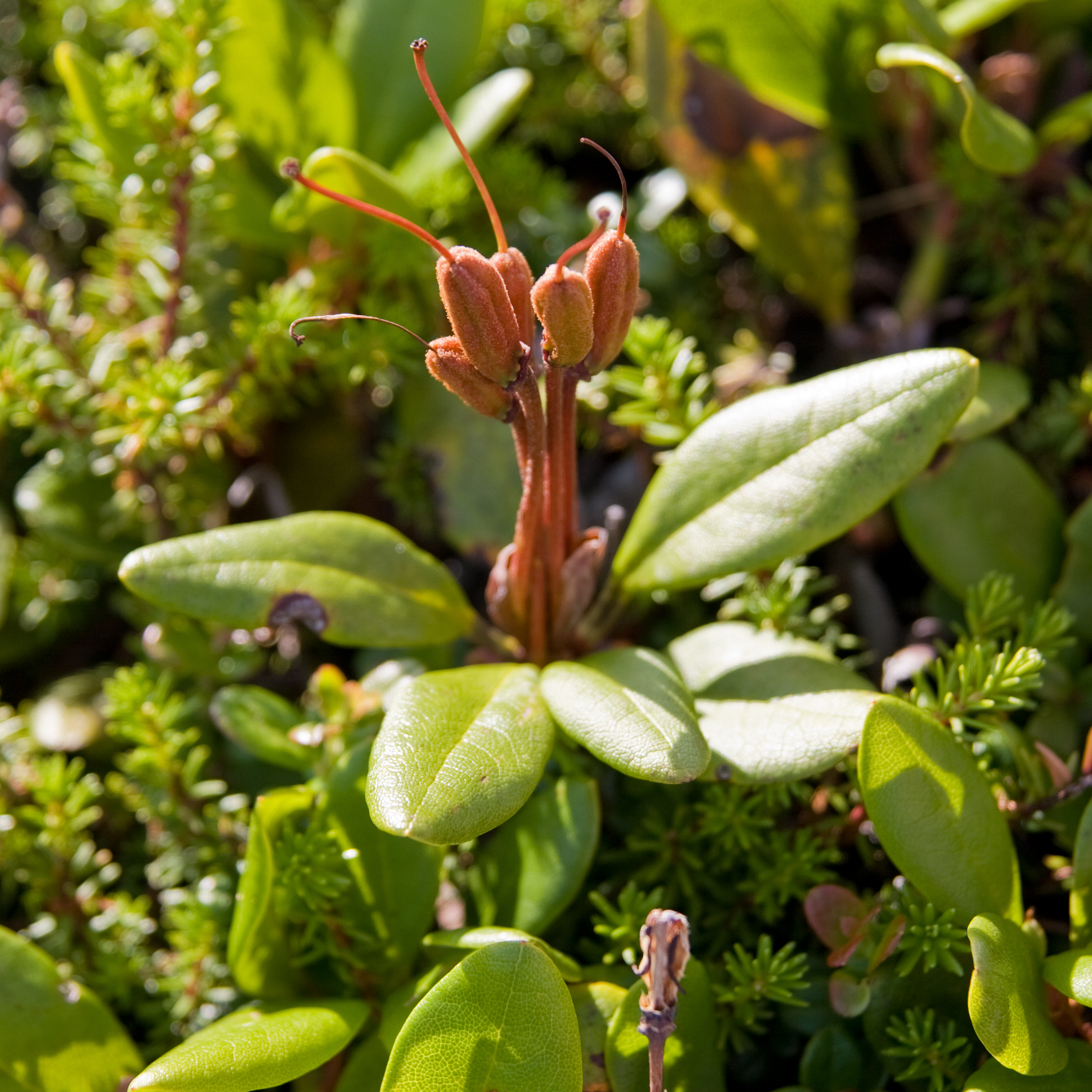 キバナシャクナゲ (学名:Rhododendron aureum)